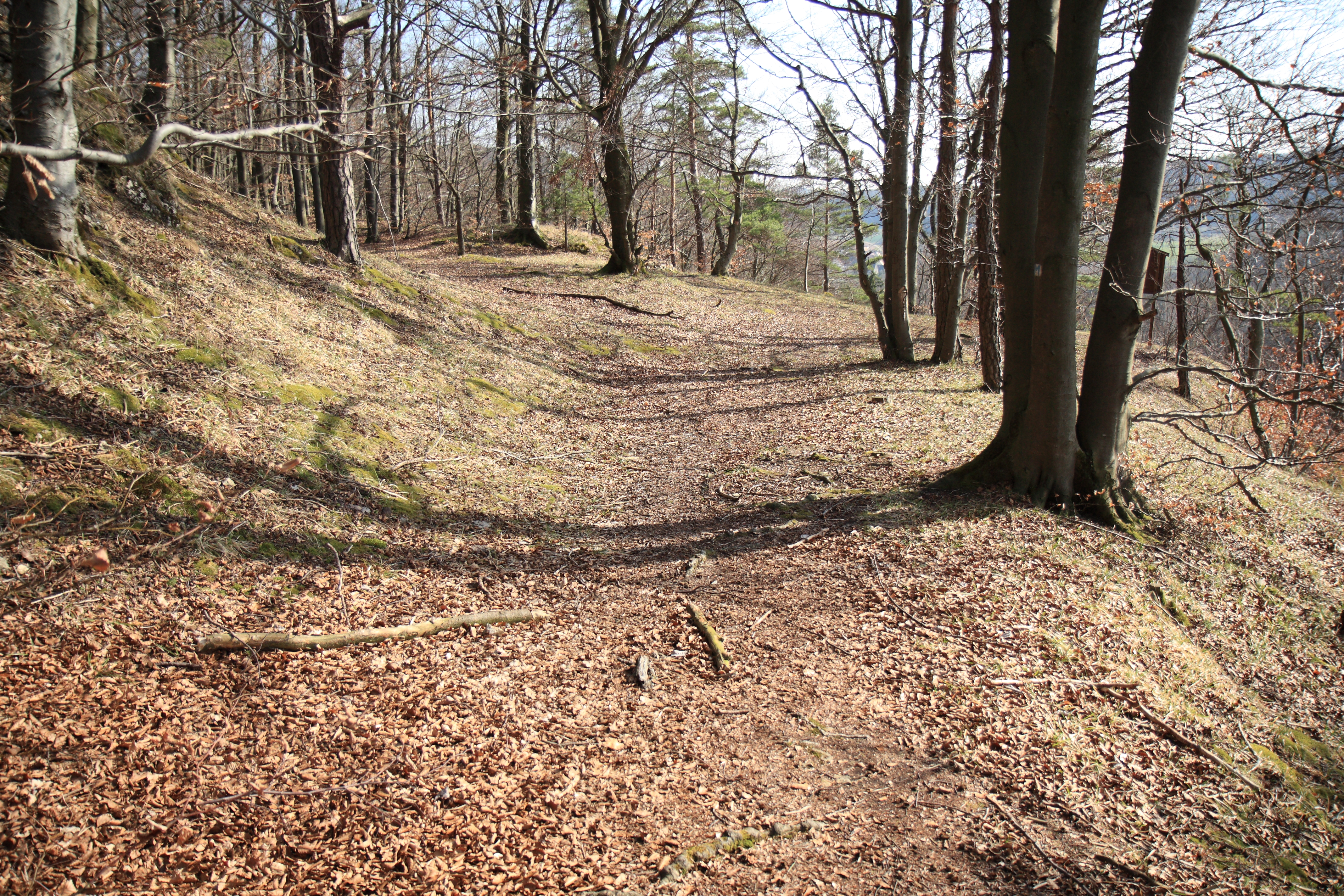 Der Bereich der westlichen Unterburg